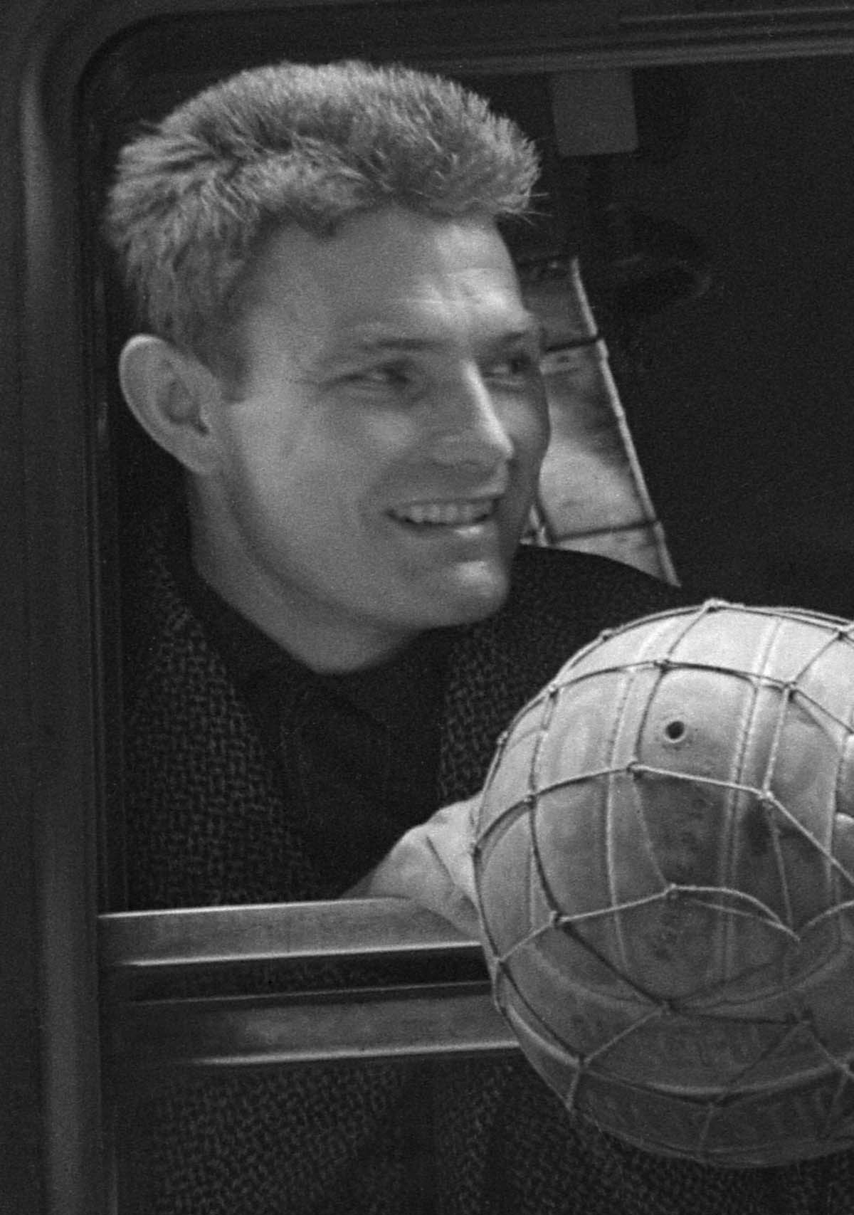 Gare Matabiau, 64 boulevard Pierre-Sémard. 1958-1959. Vue de quatre joueurs du Toulouse Football Club, dont Armand Fouillen, Georges Amanieu et Guy Roussel, à la fenêtre du train avec un départ à la gare Matabiau.